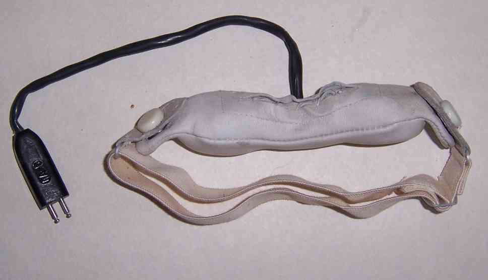 Фотоснимок ларингофонов